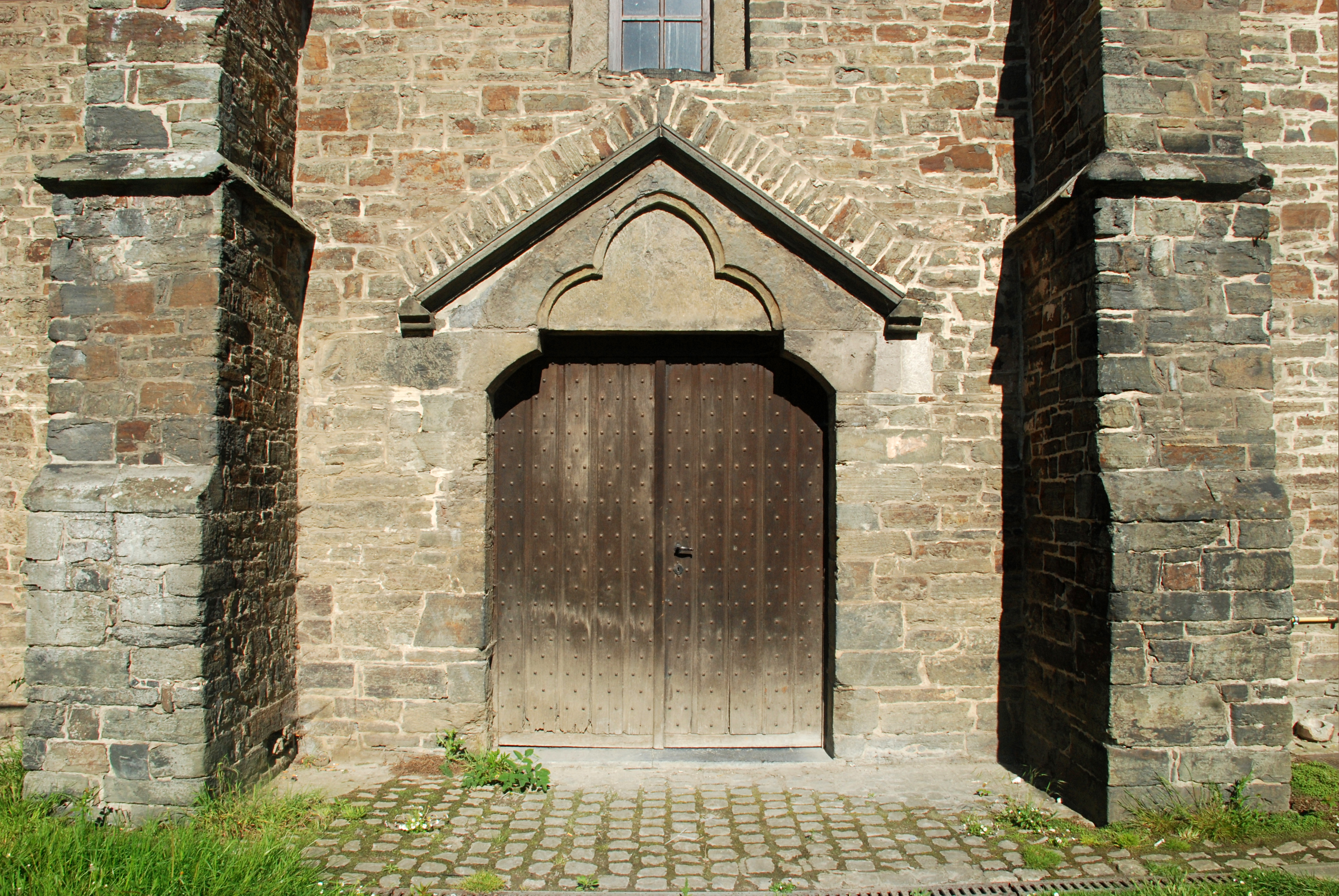 Belgique- Brabant wallon - Villers-la-Ville - ancien moulin abbatial